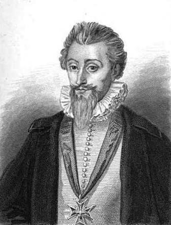 Henri de Joyeuse